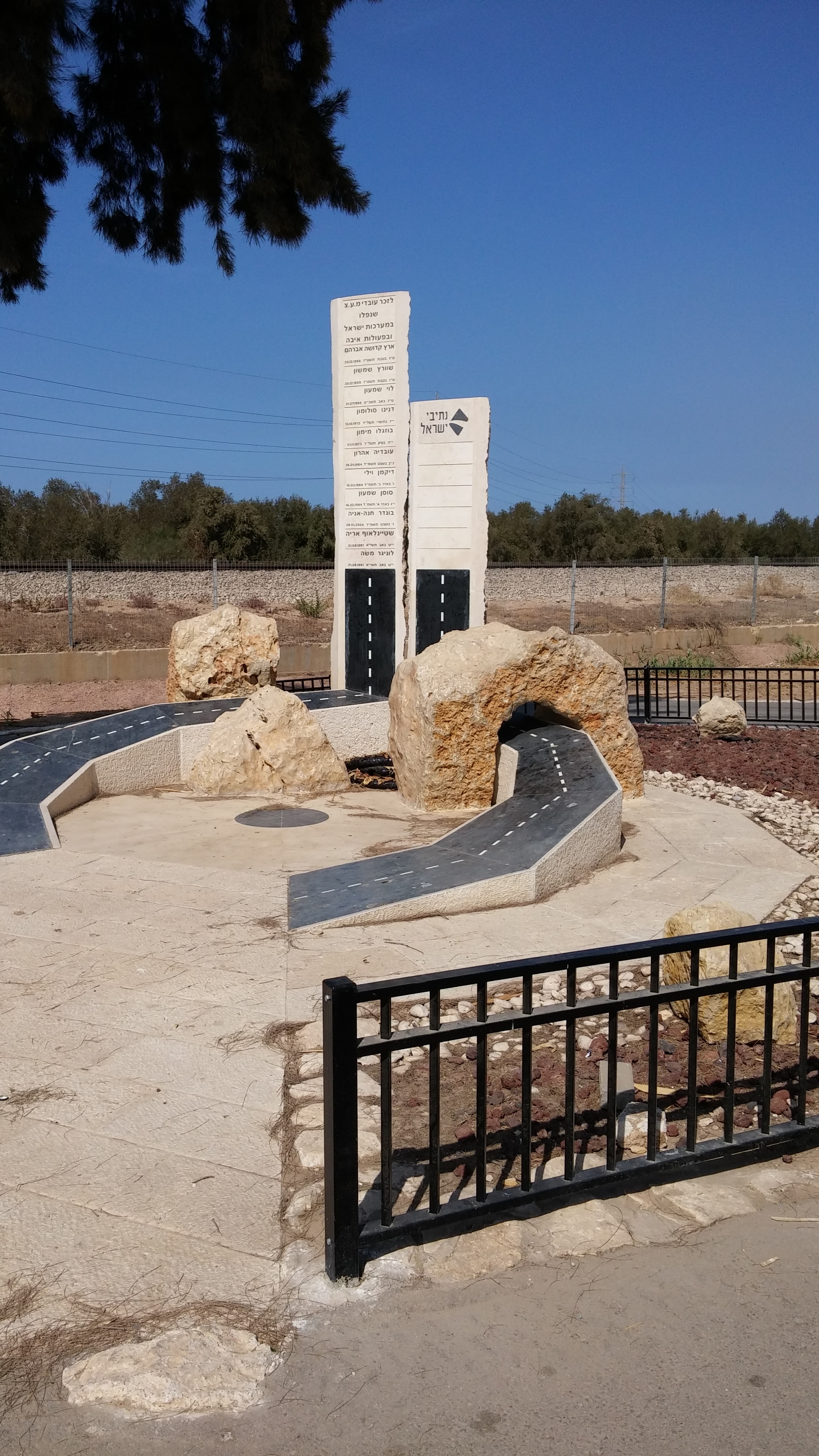 אנדרטה לזכר עובדי מעצ שנפלו במערכות ישראל ובפעולות איבה